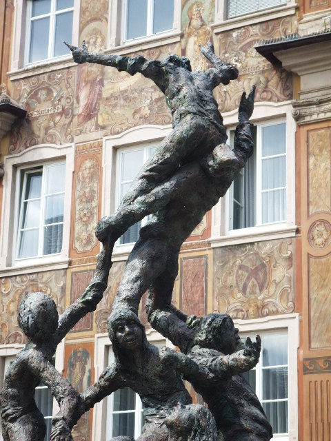 Ellwangen (Jagst), Brunnen am Fuchseck, von Rudolf Kurz, Bronze und Granit, 2002